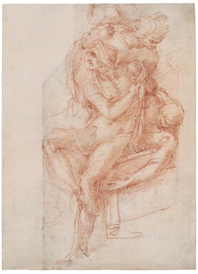 Michelangelo, lazaro, per pala sebastiano del piombo